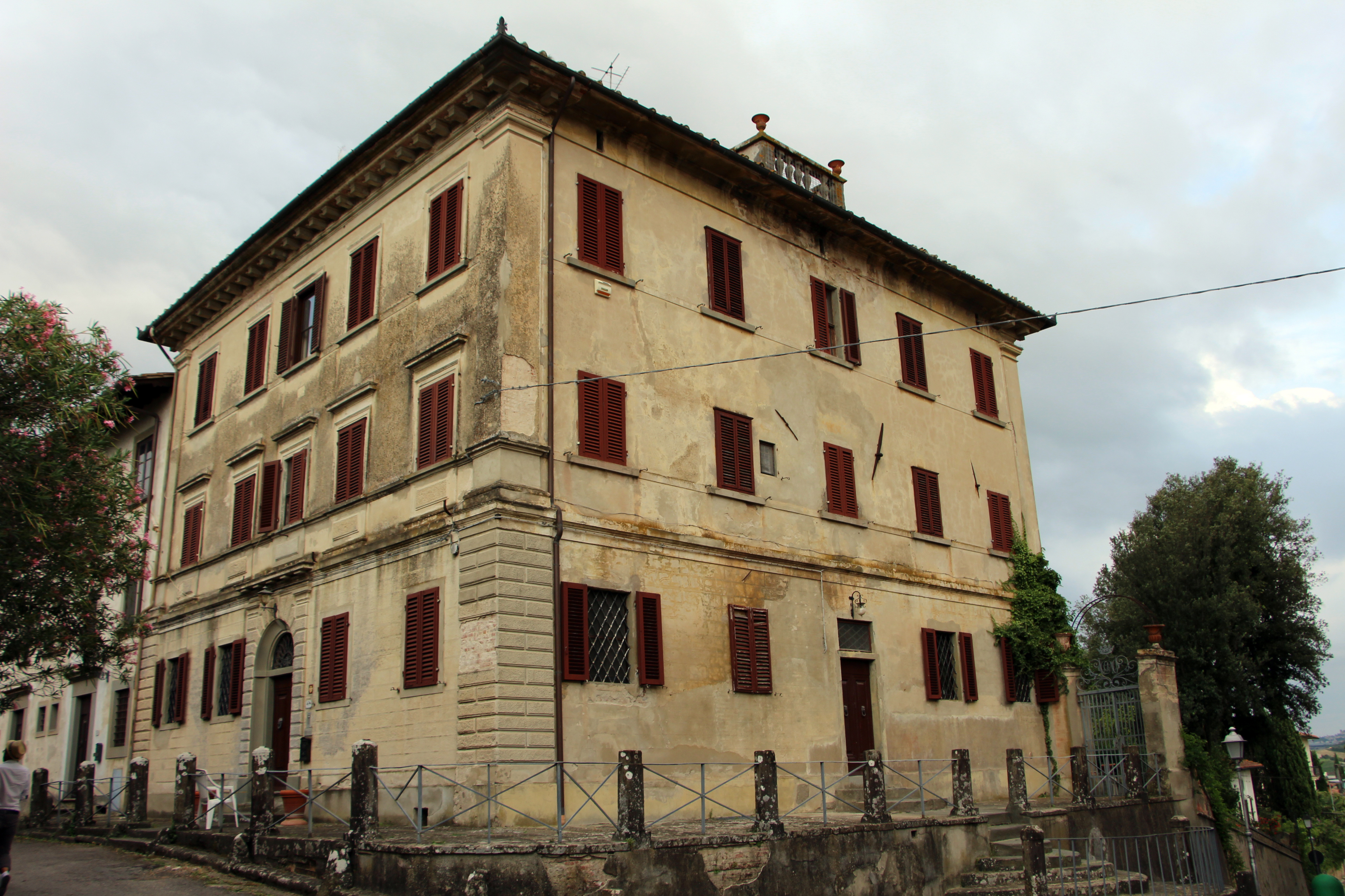 Cerreto Guidi The making of this document was supported by Wikimedia CH. (Submit your project!) For all the files concerned, please see the category Supported by Wikimedia CH.